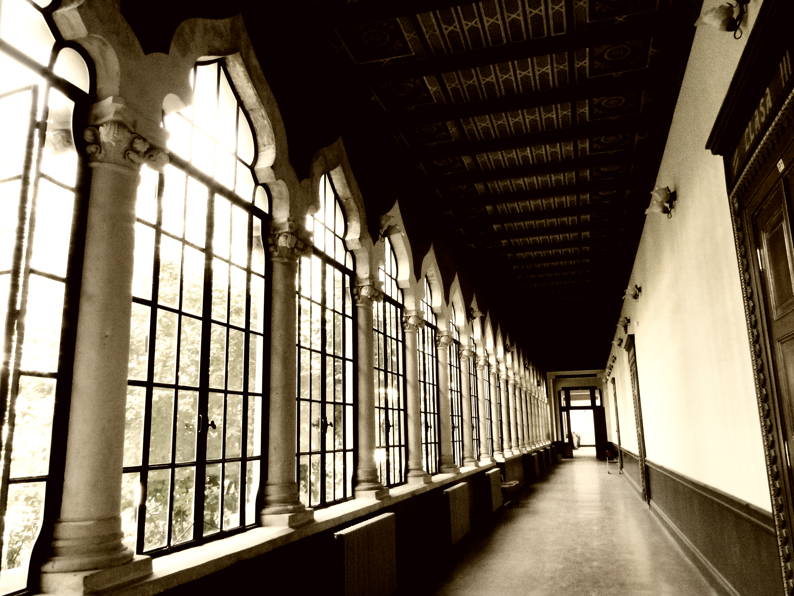 Școala Centrală de Fete